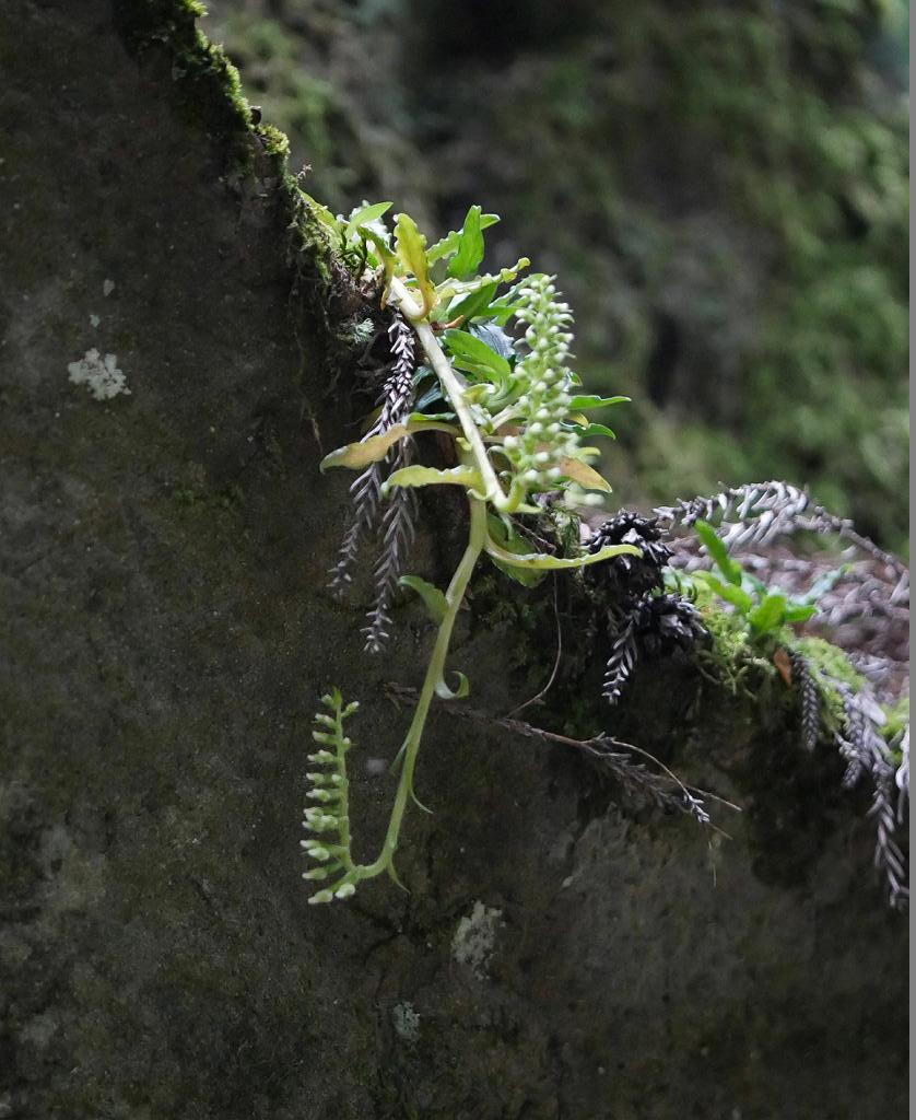 2018/08/01 和歌山県：Wakayama Pref. Japan